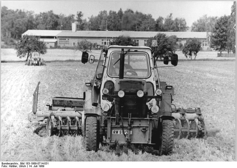 LPG Niederkaina, Vorbereitung für Aussaat ADN-ZB Häßler 14.7.89 Bez. Dresden: Nach Beendigung der Getreideernte brechen die Genossenschaftsbauern der LPG (P) in Niederkaina die Schläge sofort um. Auf 1.200 Hektar, das entspricht 16, 8 Prozent des Ackerlandes, sollen Sommerzwischenfrüchte angebaut werden.